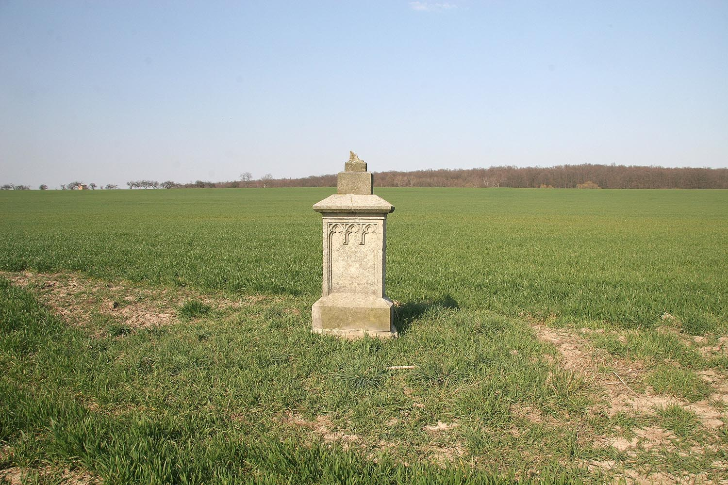 Pomník padlých z bitvy u Hradce Králové roku 1866 v poli u obce Čistěves